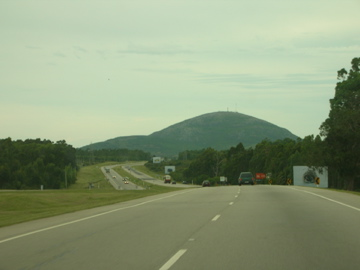 Cerro Pan de Azucar fotografiado (desde la Ruta Interbalnearia cerca de Las Flores)